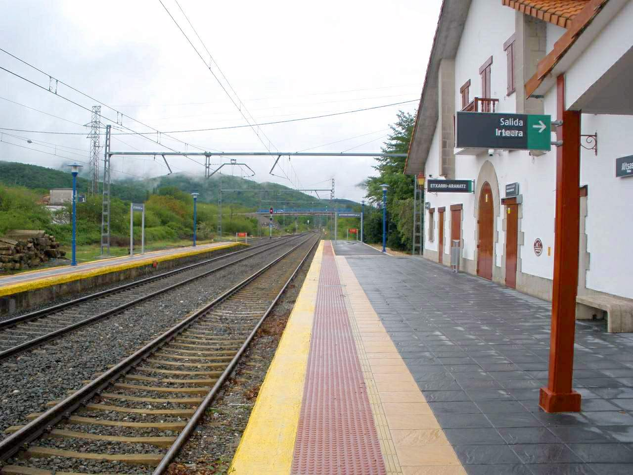 Estación de Echarri-Aranaz (Navarra)